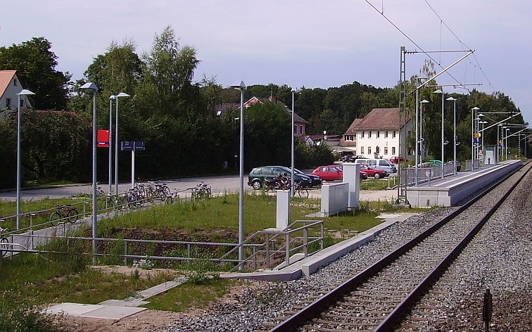 Triesdorf Bhf Lizenz: Template:Vorlage:Bild-frei